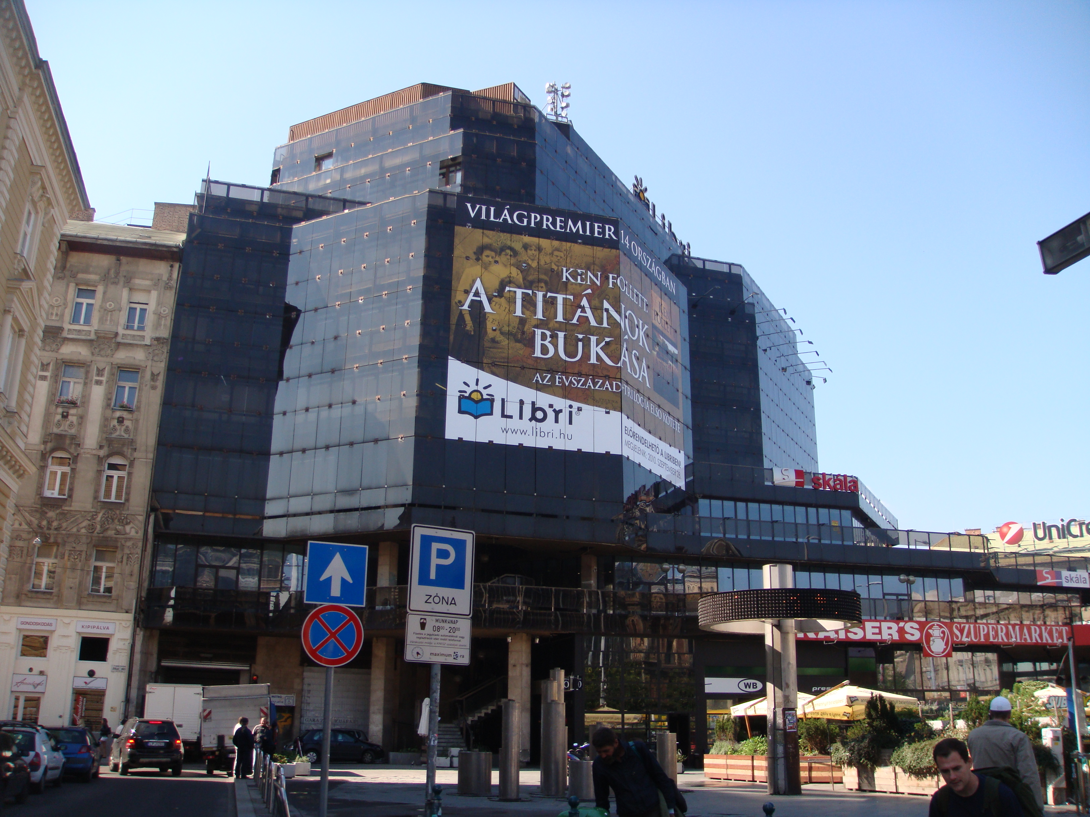 торговый центр